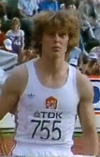 Ján Čado